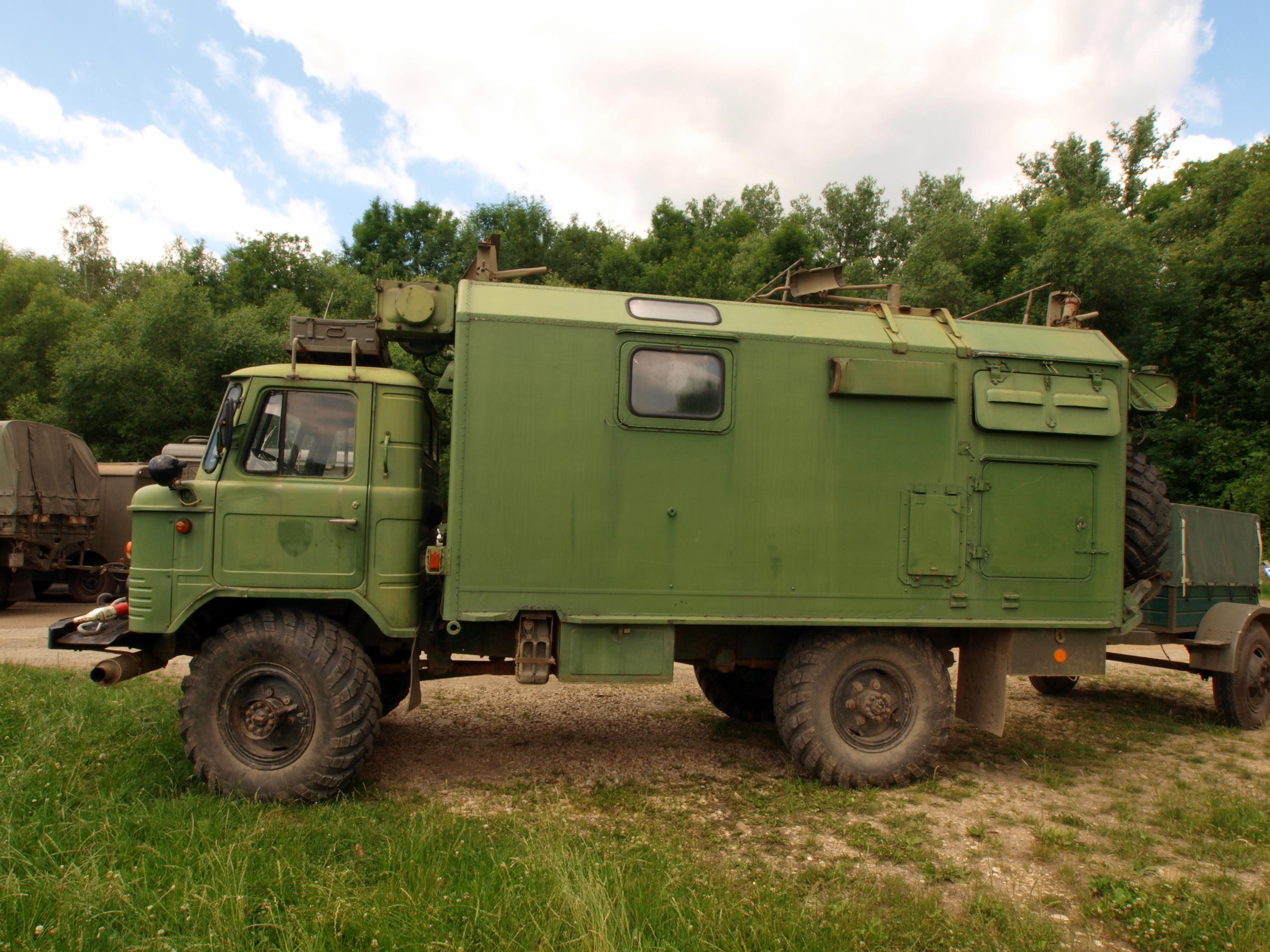 GAZ 66.